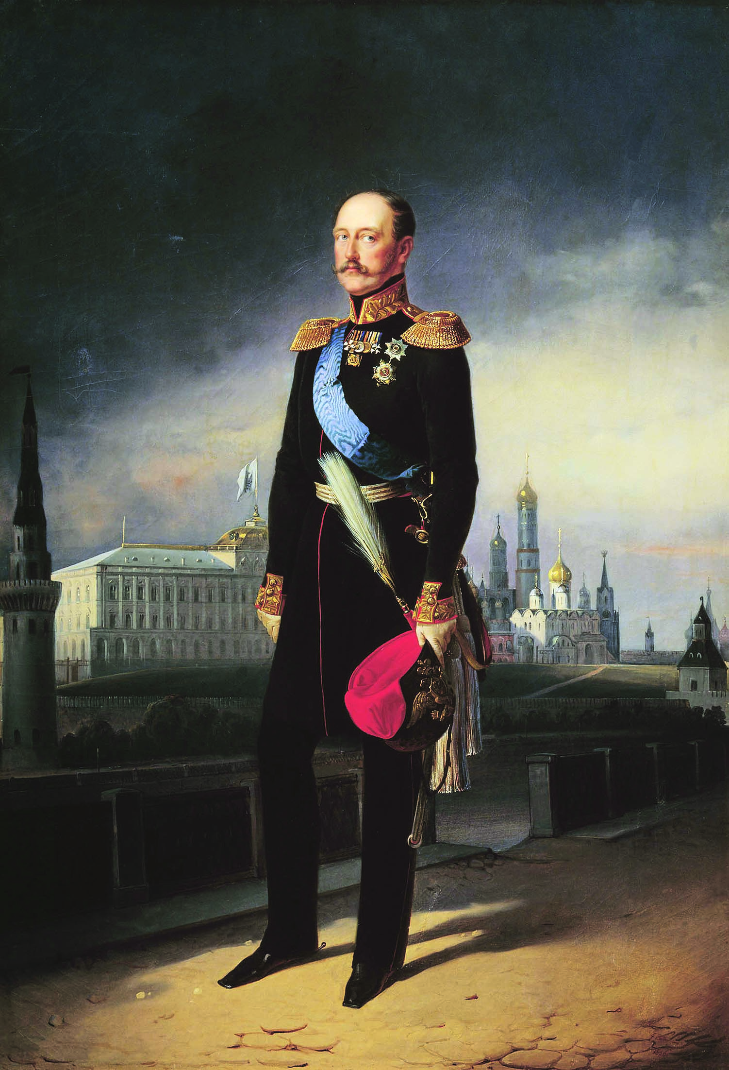 Портрет императора Николая I. 1856. Холст, масло. 90х60 см